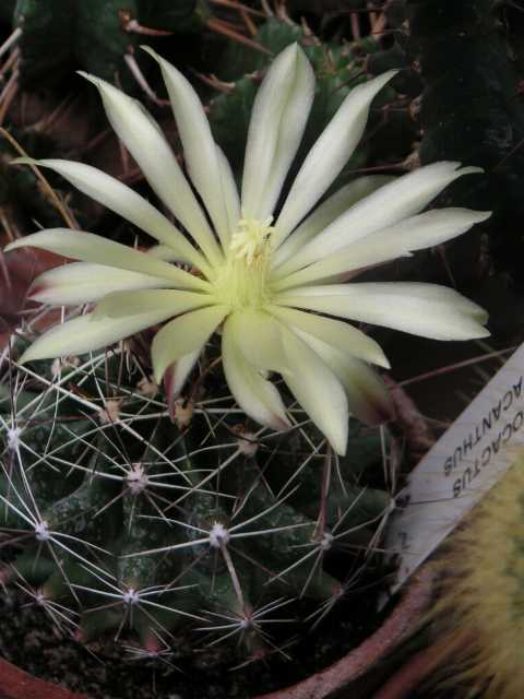 Description: Hamatocactus hamatacanthus, août 2004, collection personnelle Source: Jean-Jacques MILAN Licence: GFDL Jean-Jacques MILAN